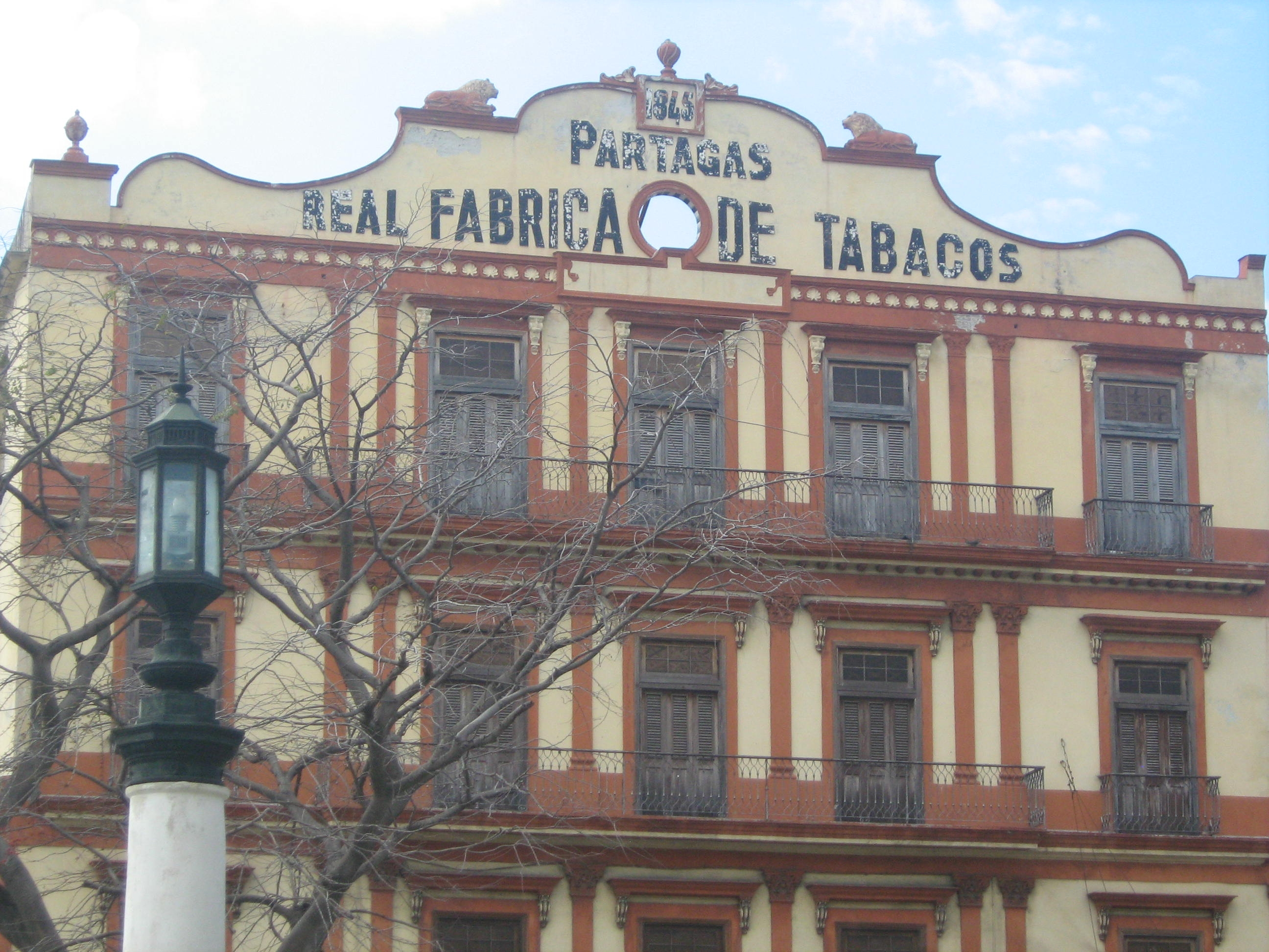 Fábrica